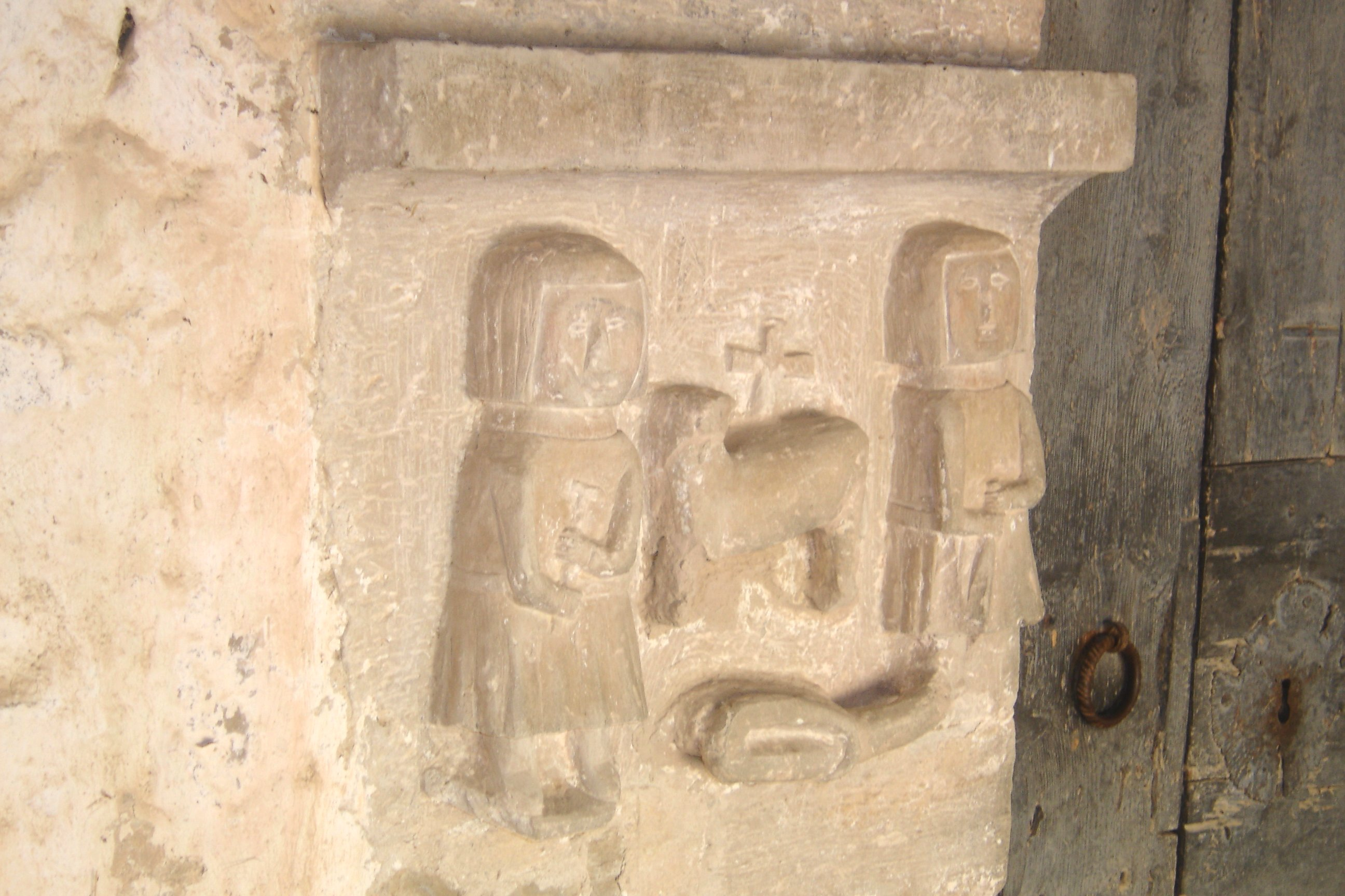 L'ermita de Sant Lleïr de Casabella, al municipi de La Coma i la Pedra, a la Vall de Lord (Solsonès). El grup escultòric de l'esquerra de la poertalada